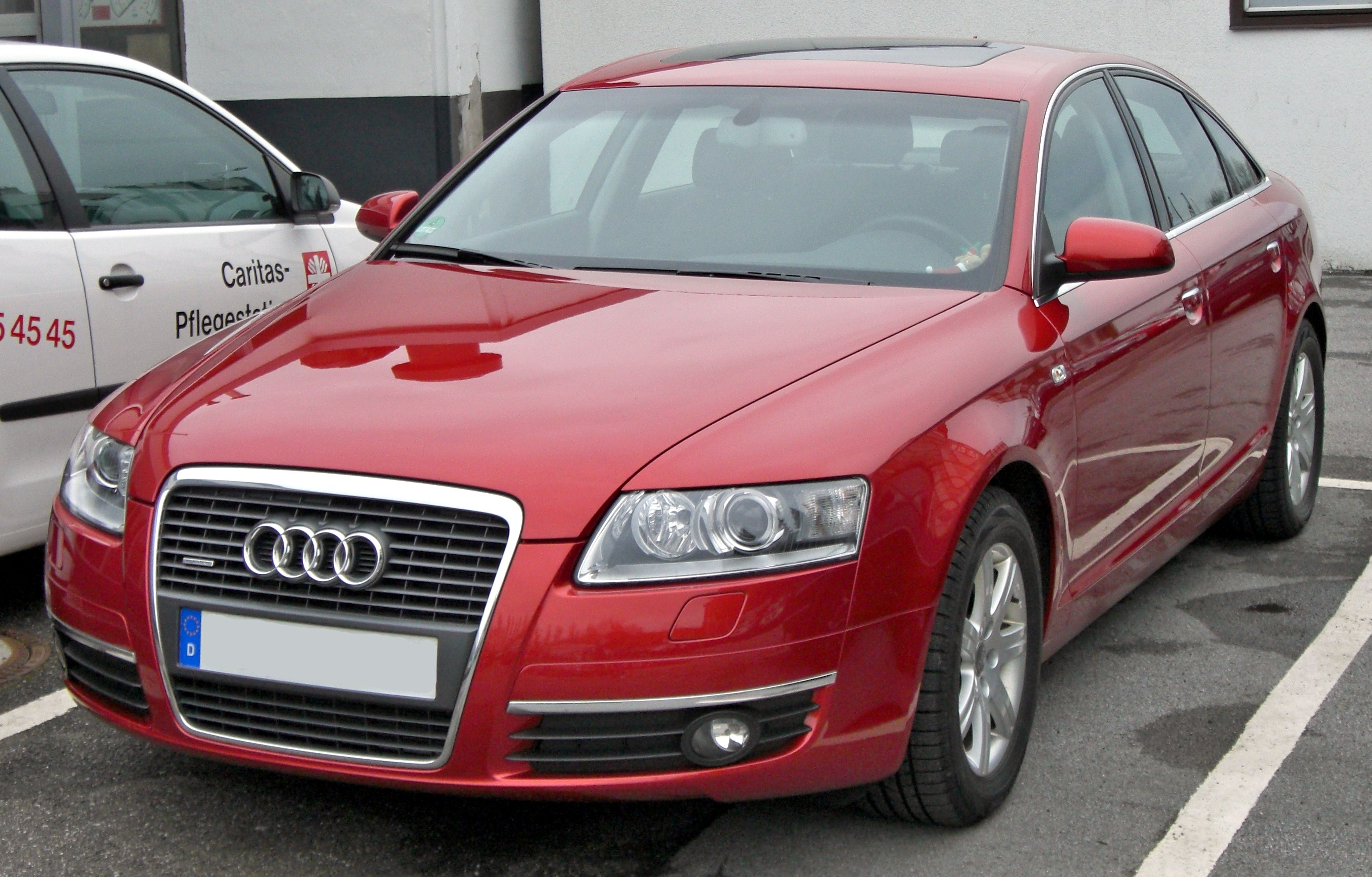 Audi A6